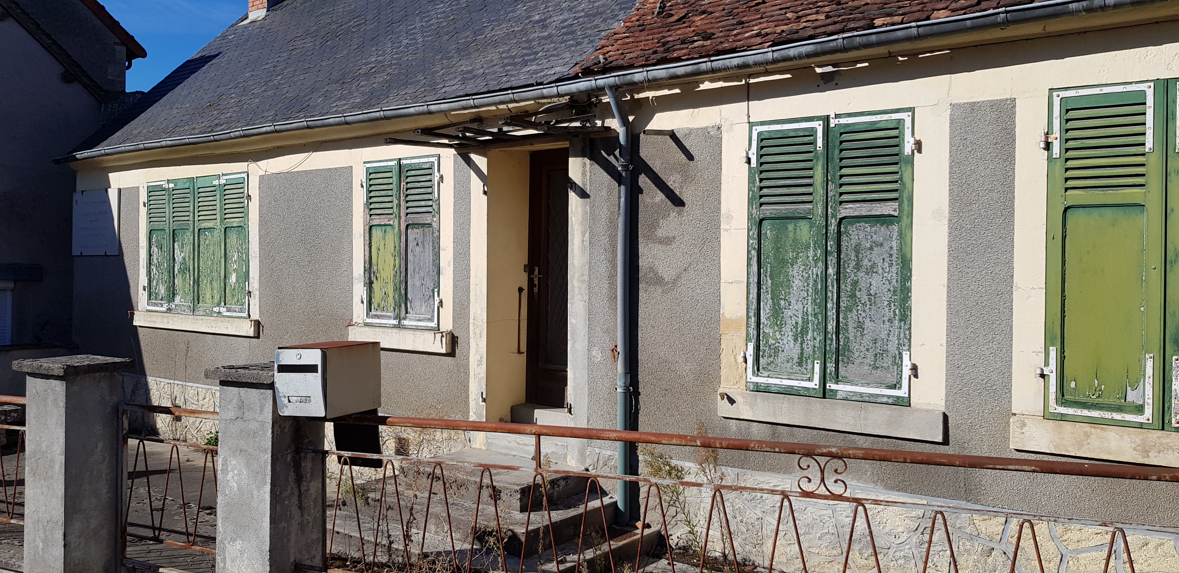 Maison où est décédé le chanoine Jean-Marie Meunier à Chaulgnes, Nièvre.